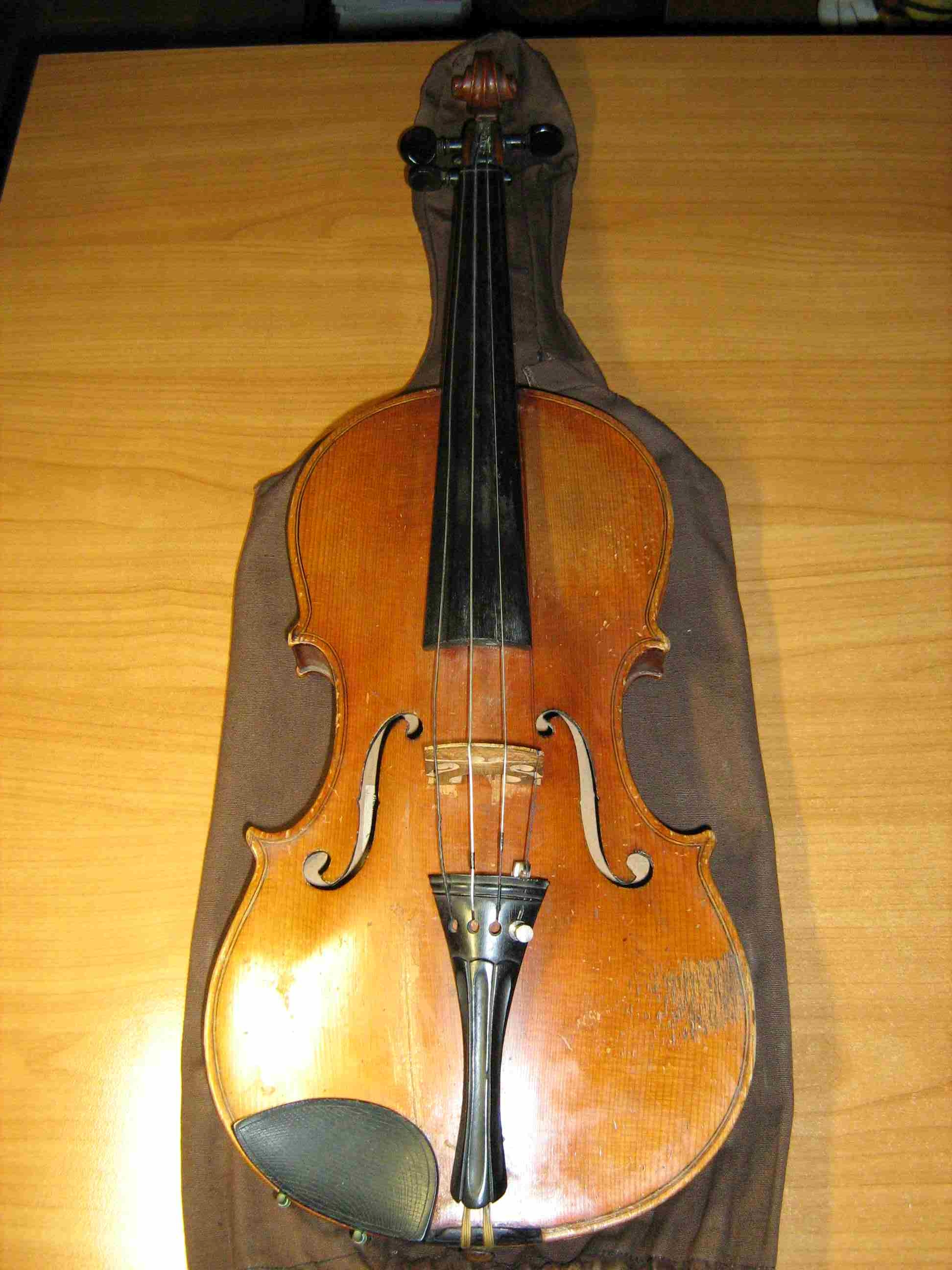 Скрипка 1914 August Kristall viiul AUGUST KRISTALL